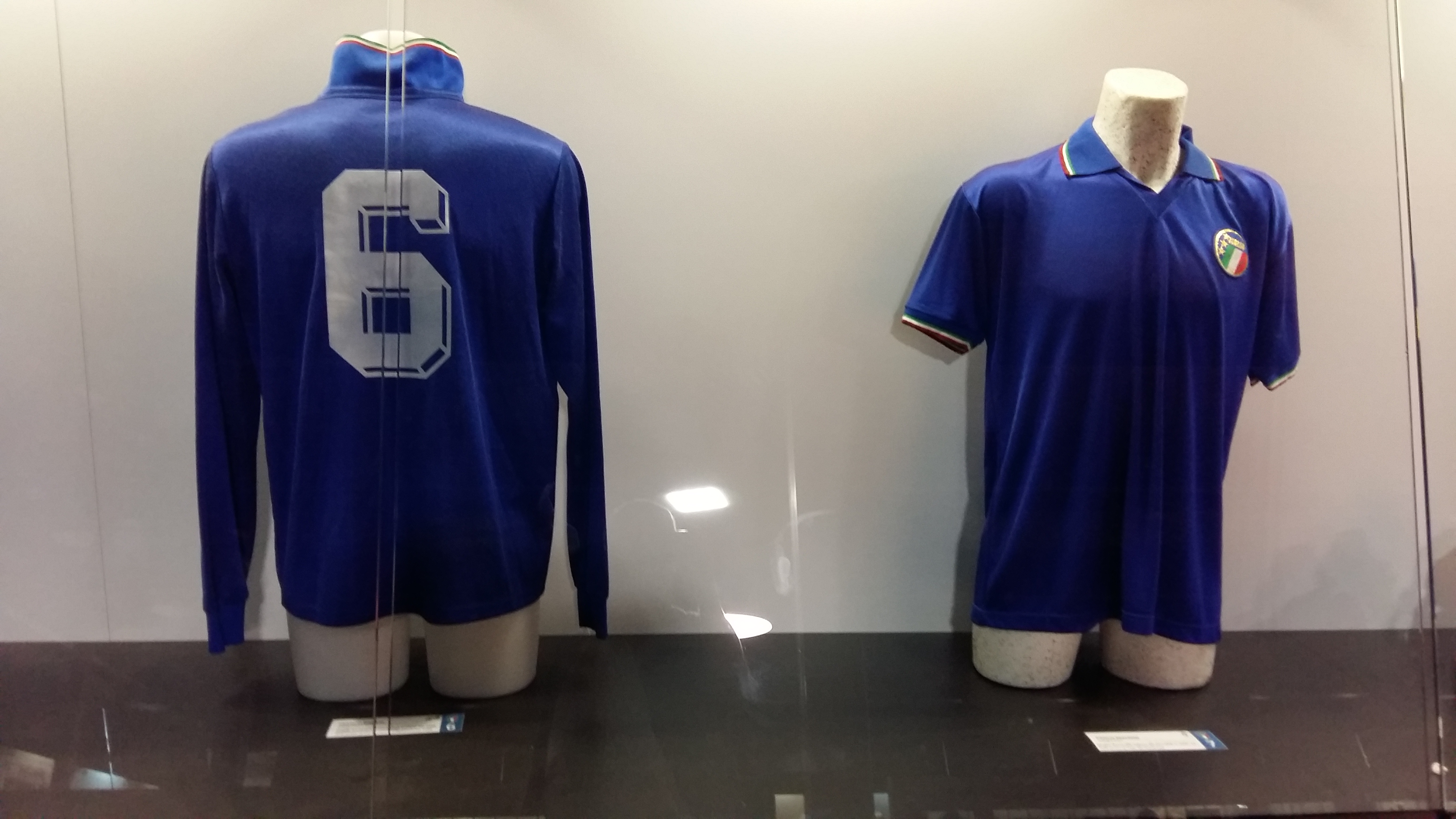 Футболки Франко Барези (№ 6) и Паоло Мальдини в форме сборной Италии в музее Сан-Сиро.